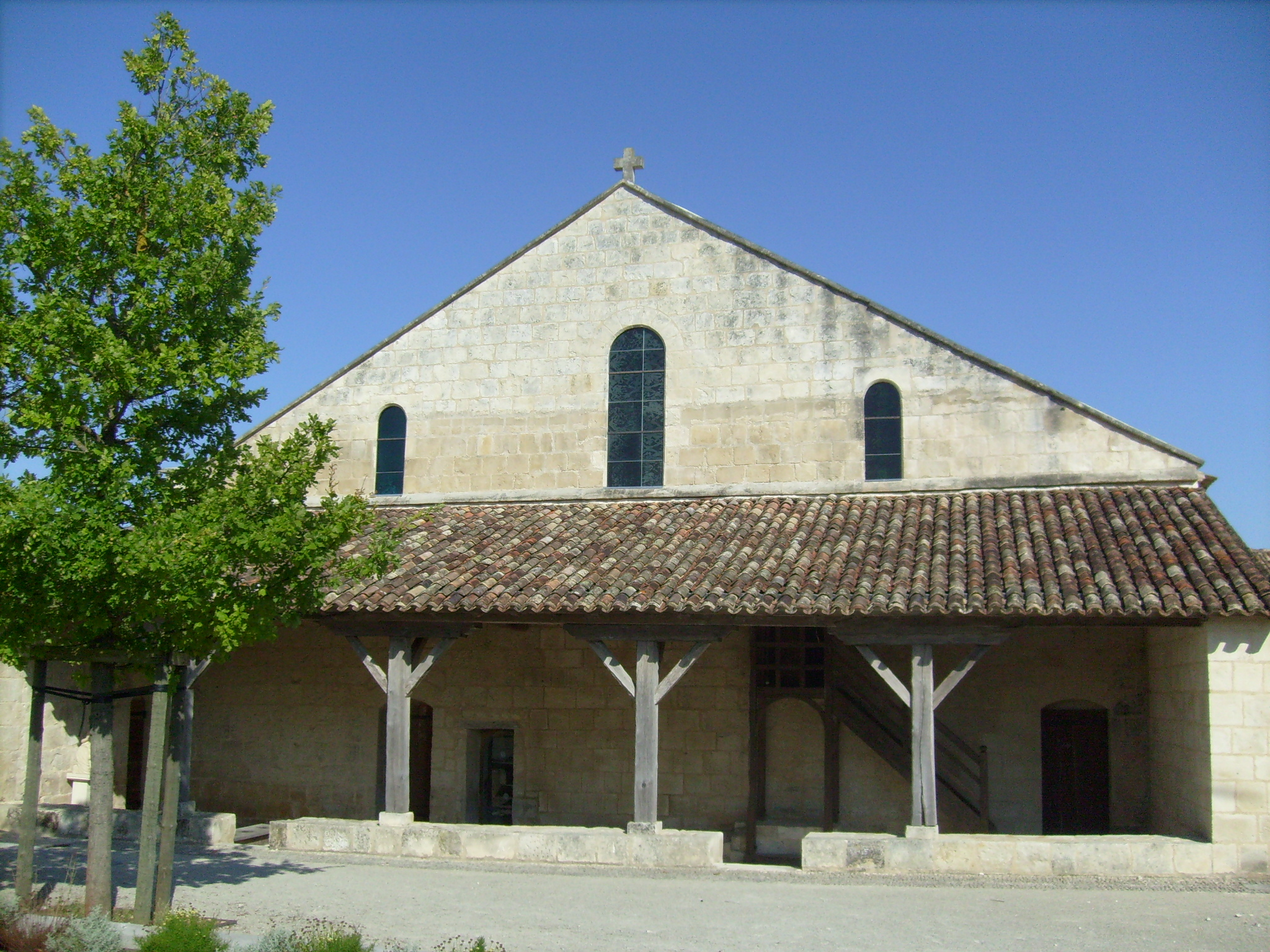 Les jardins de l'hospice des pèlerins à Pons